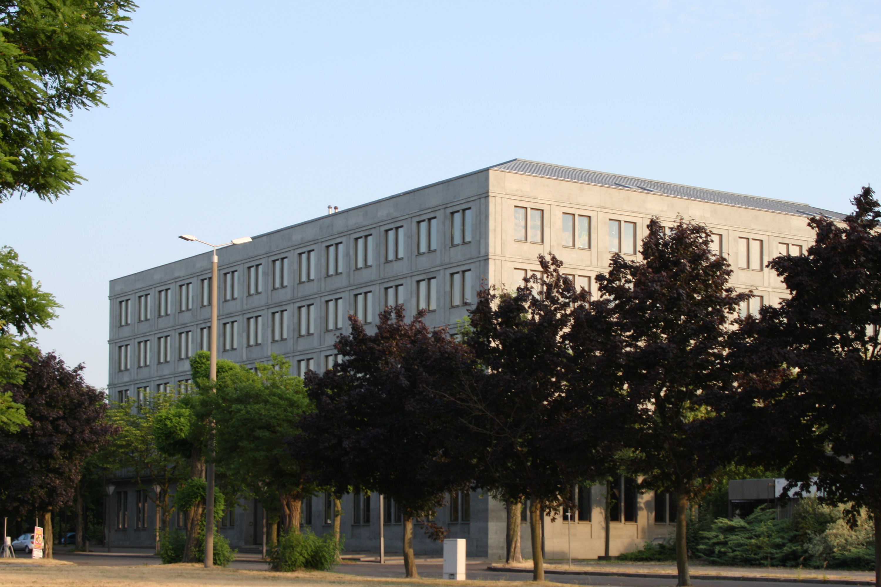 Gebäude der Bundesbank auf dem alten Leipziger Messeglände